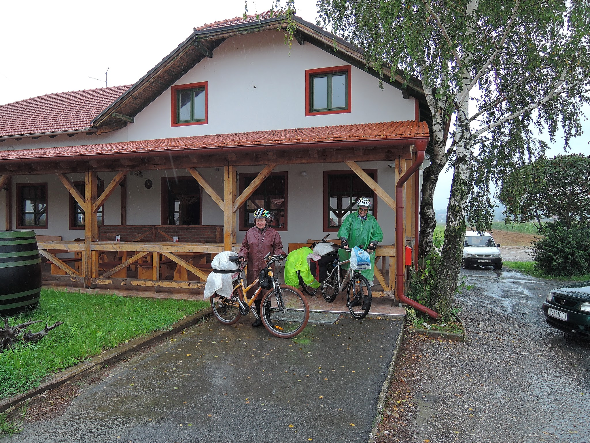 Donje Vratno, Croatia